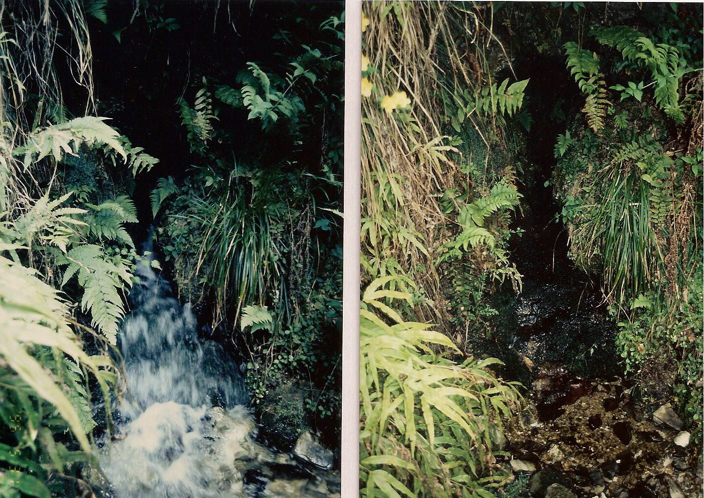 左：湧出時（1995/5/31） 右：停止時